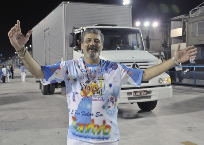 Ensaio técnico da Caprichosos de Pilares no Sambódromo. Foto: Ricardo Almeida.